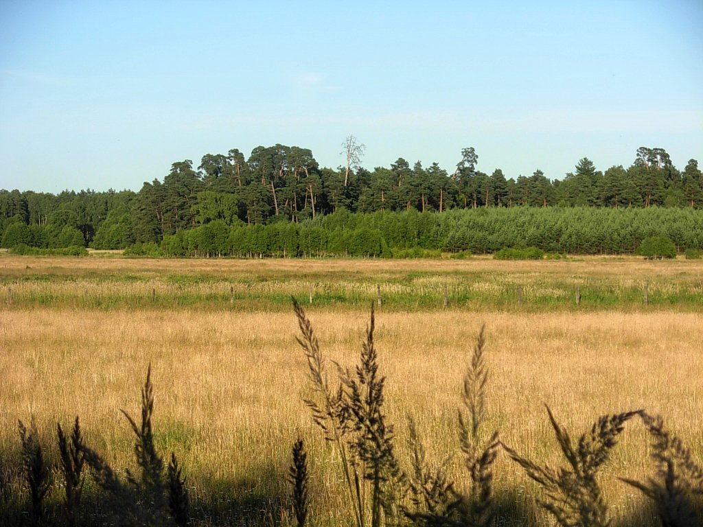 Puszcza Bydgoska, Łąki Studzienieckie